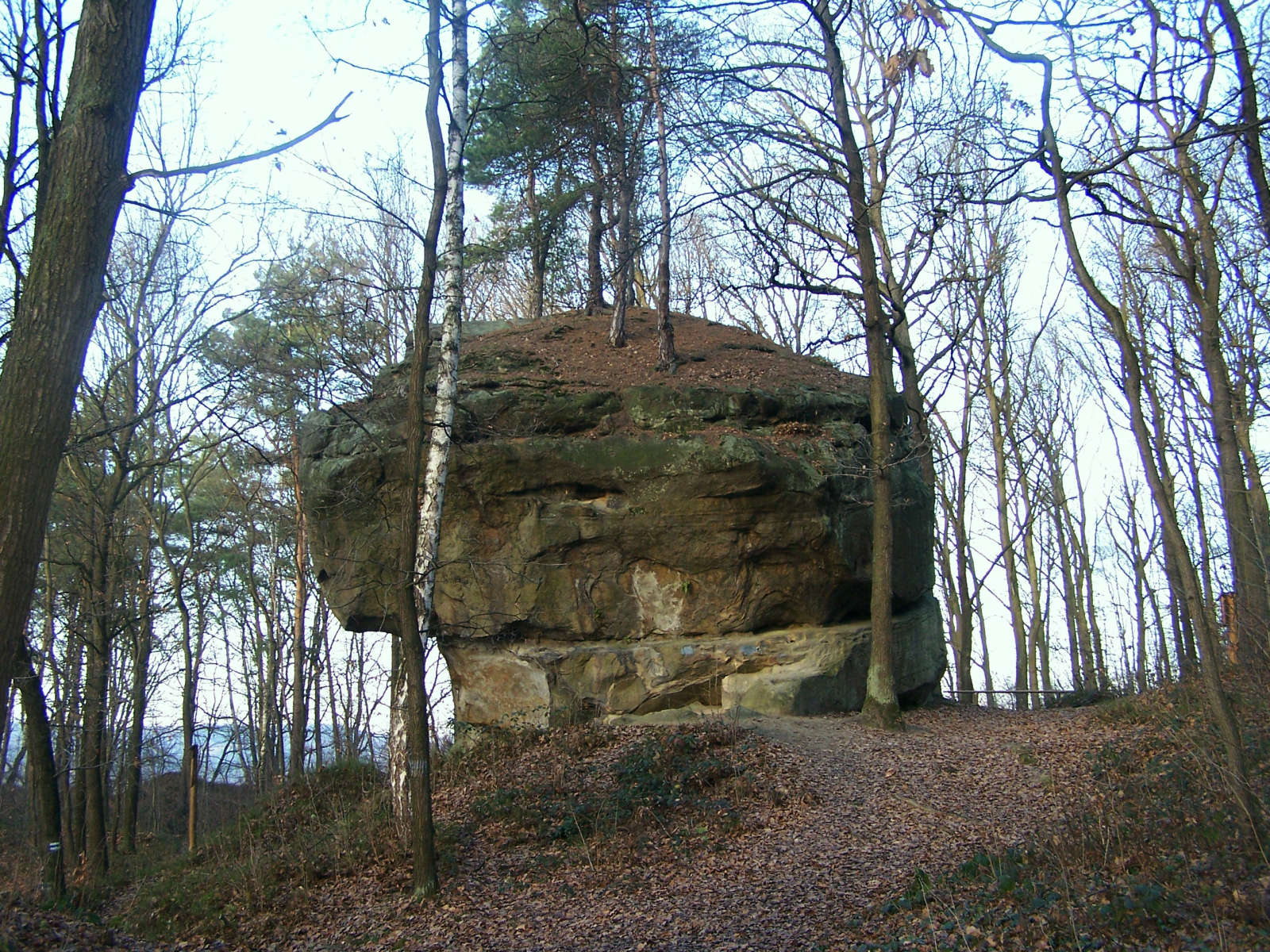 Skamieniałe Miasto (Pogórze Rożnowskie)